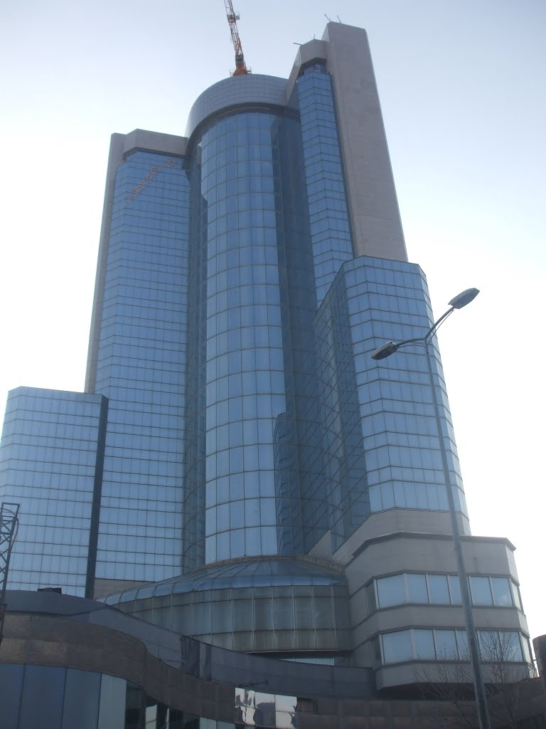 Rajiv Gandhi Caddesi, Kızılay (2013).